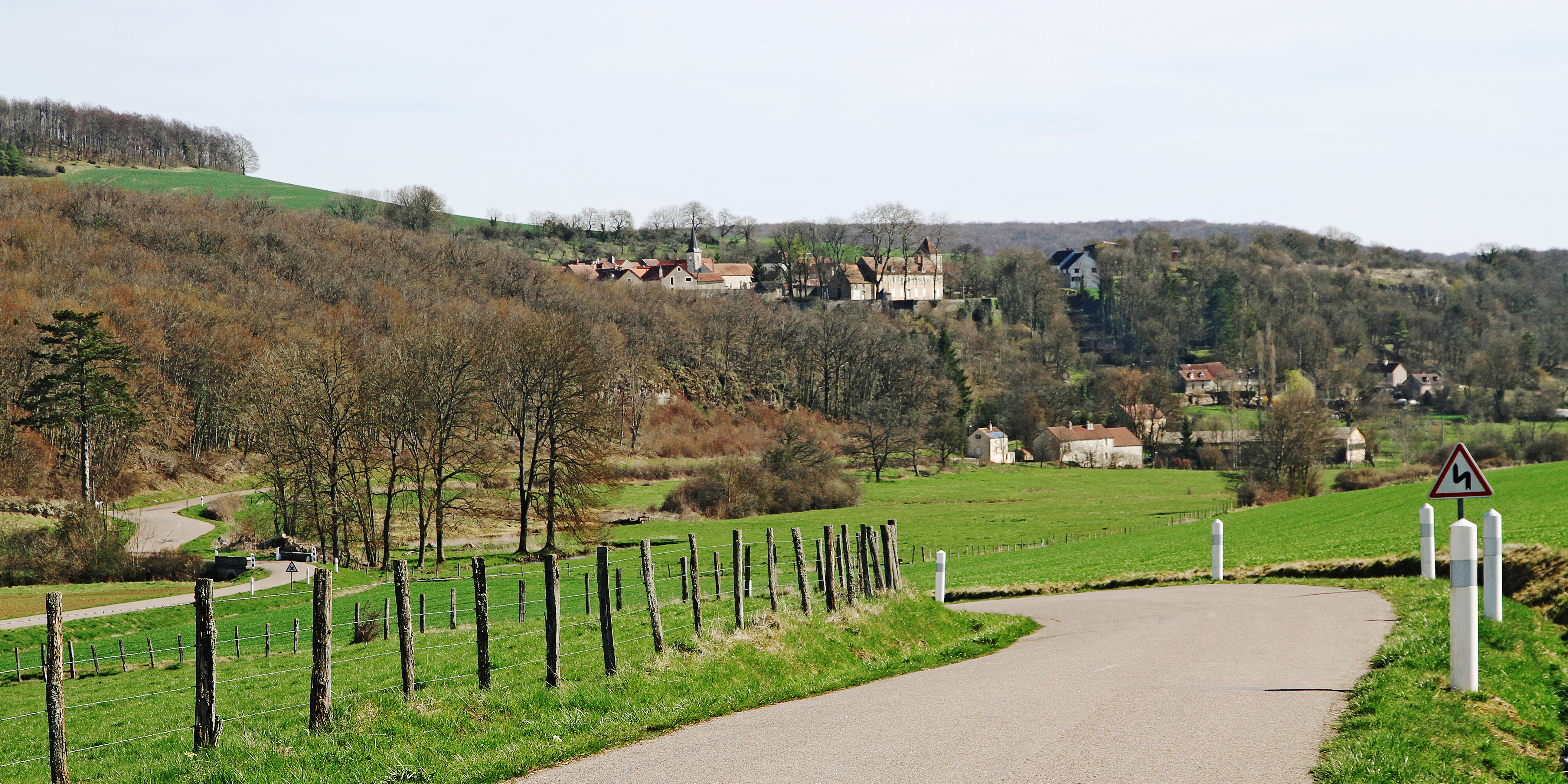 Village de Barjon sur sa colline, vue sur l'église et le château